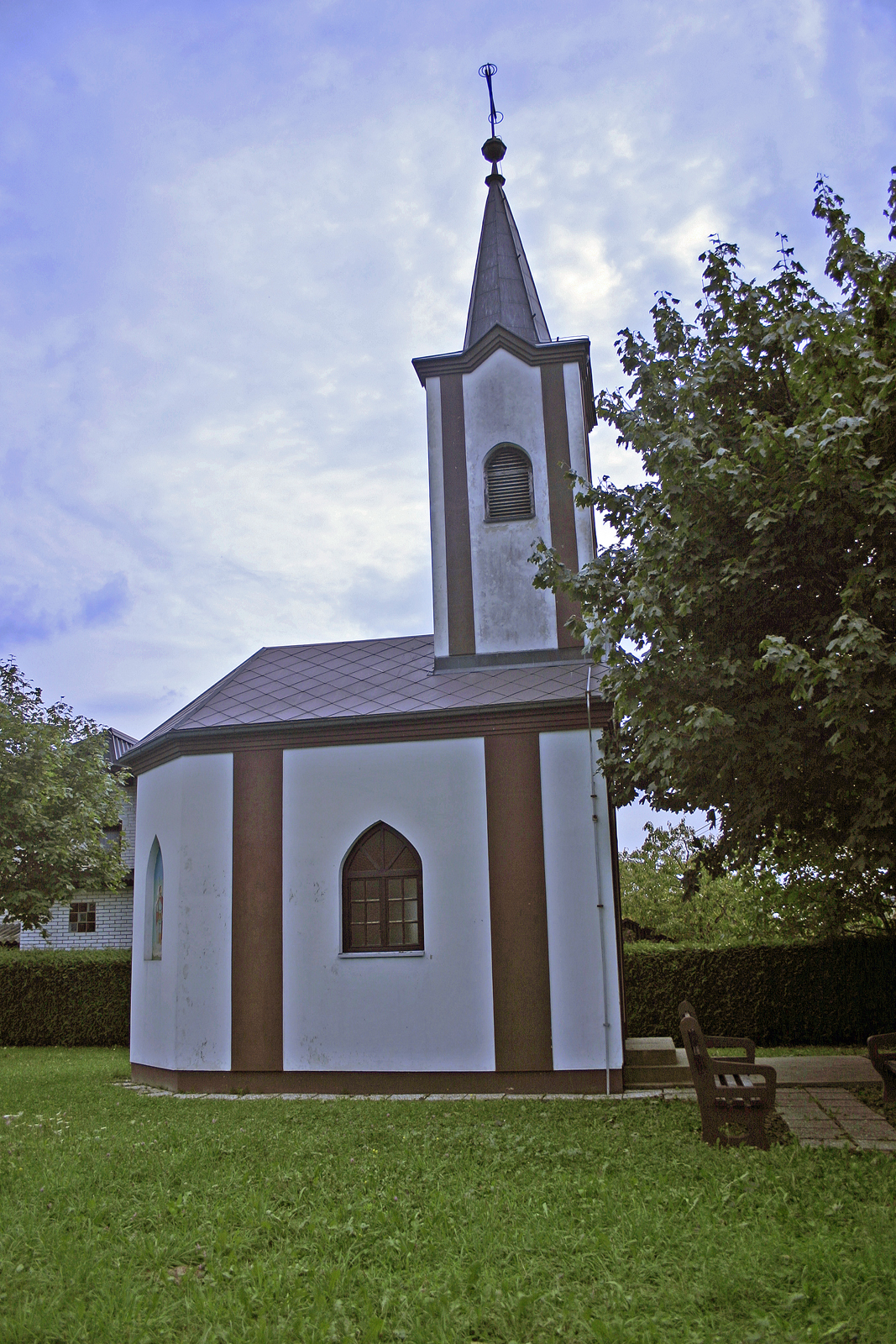 Kapela Svetega Duha, Korovci. Holy spirit chapel, Korovci. Heiliger Geist Kapelle, Korovci.